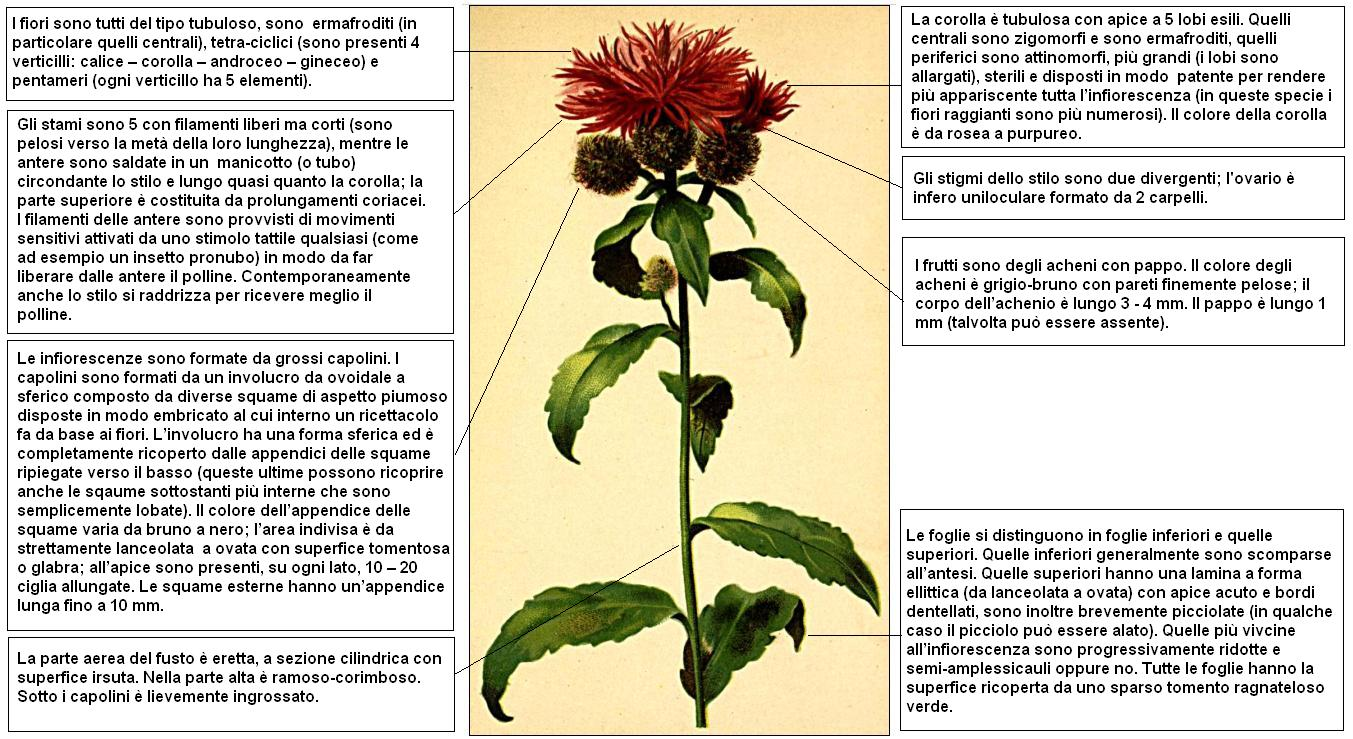 Centaurea phrygia Hartinger DESC